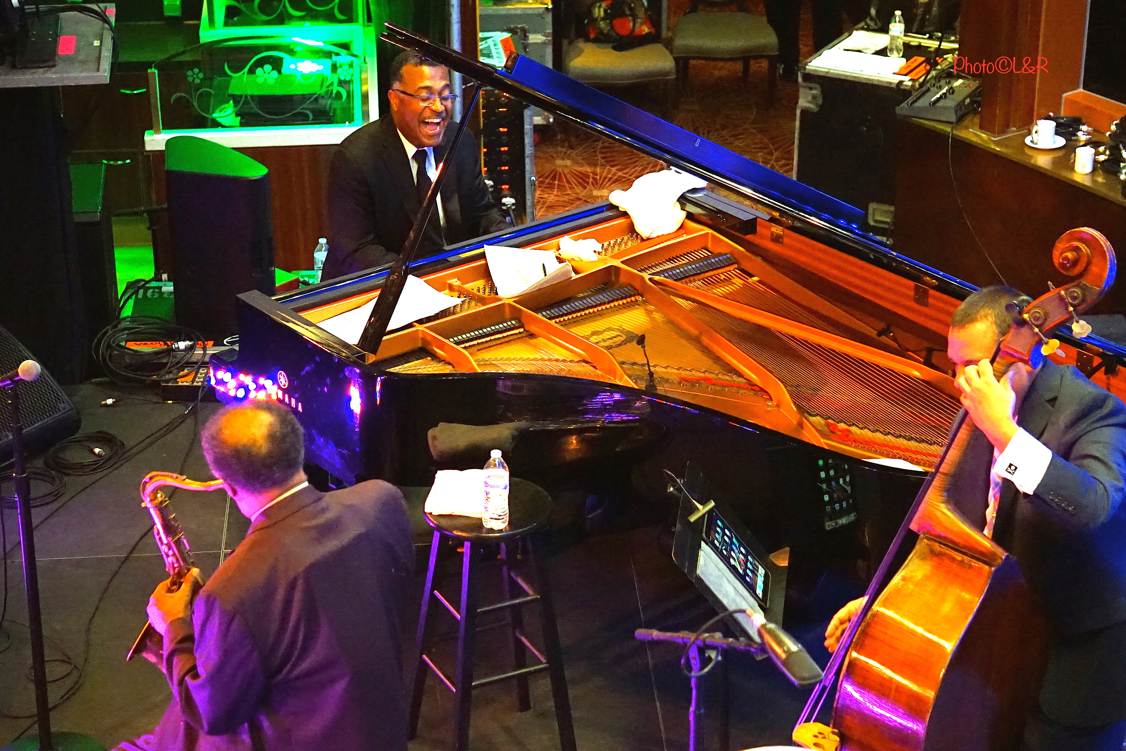 ジャズクルーズにてヒューストン・パーソン・カルテットのピアニストとして演奏、バードランド会場にて